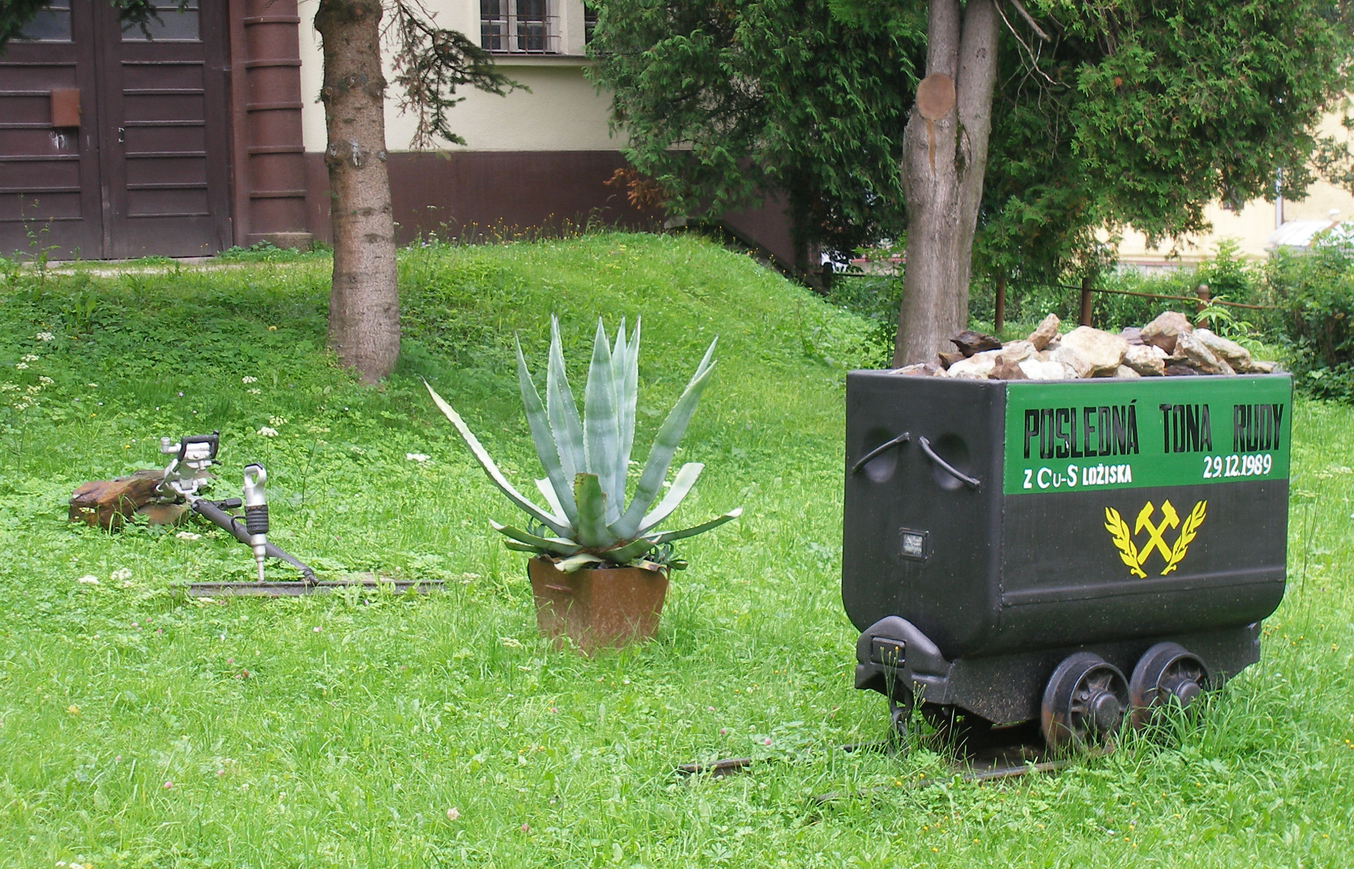 Obec Smolník, okres Gelnica.